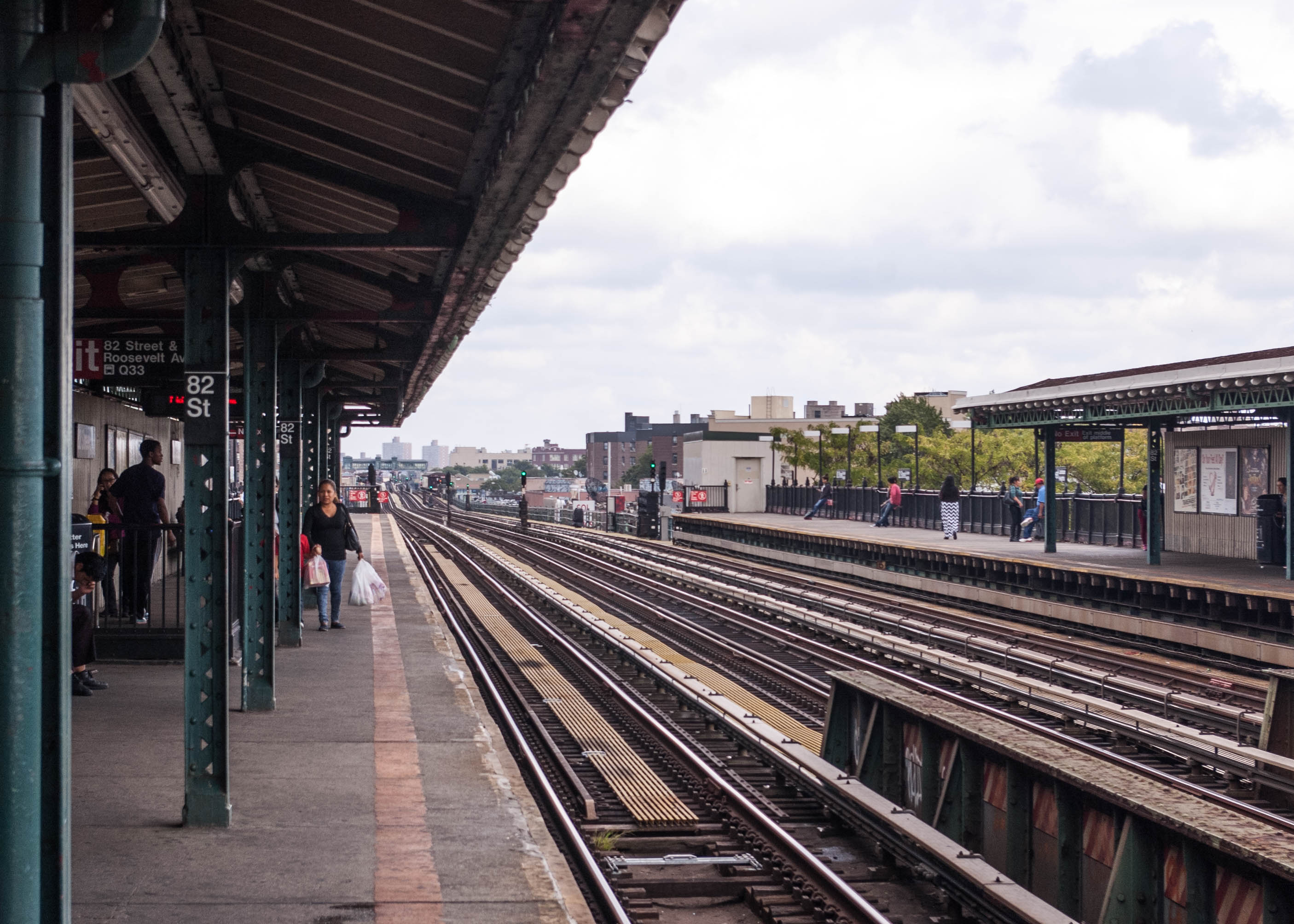 20140920-IMGP0606